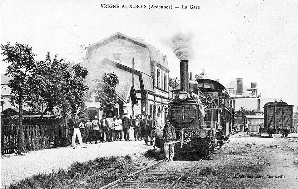 Intérieur de la gare de Vrigne-aux-Bois avec la locomotive 030 T Est dénommée La Thur (n°0.208).